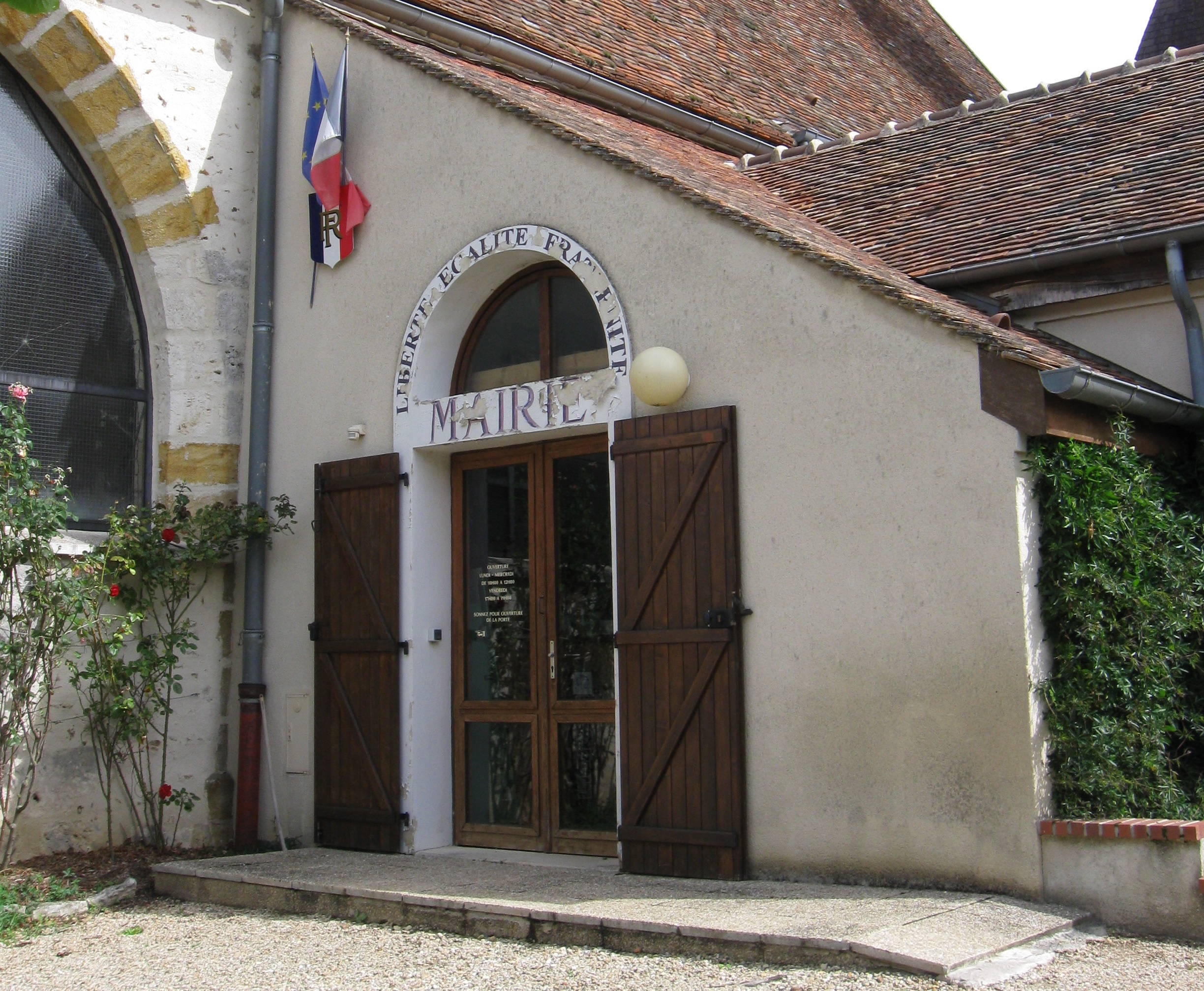 Mairie de Coutençon. (Seine-et-Marne, région Île-de-France).